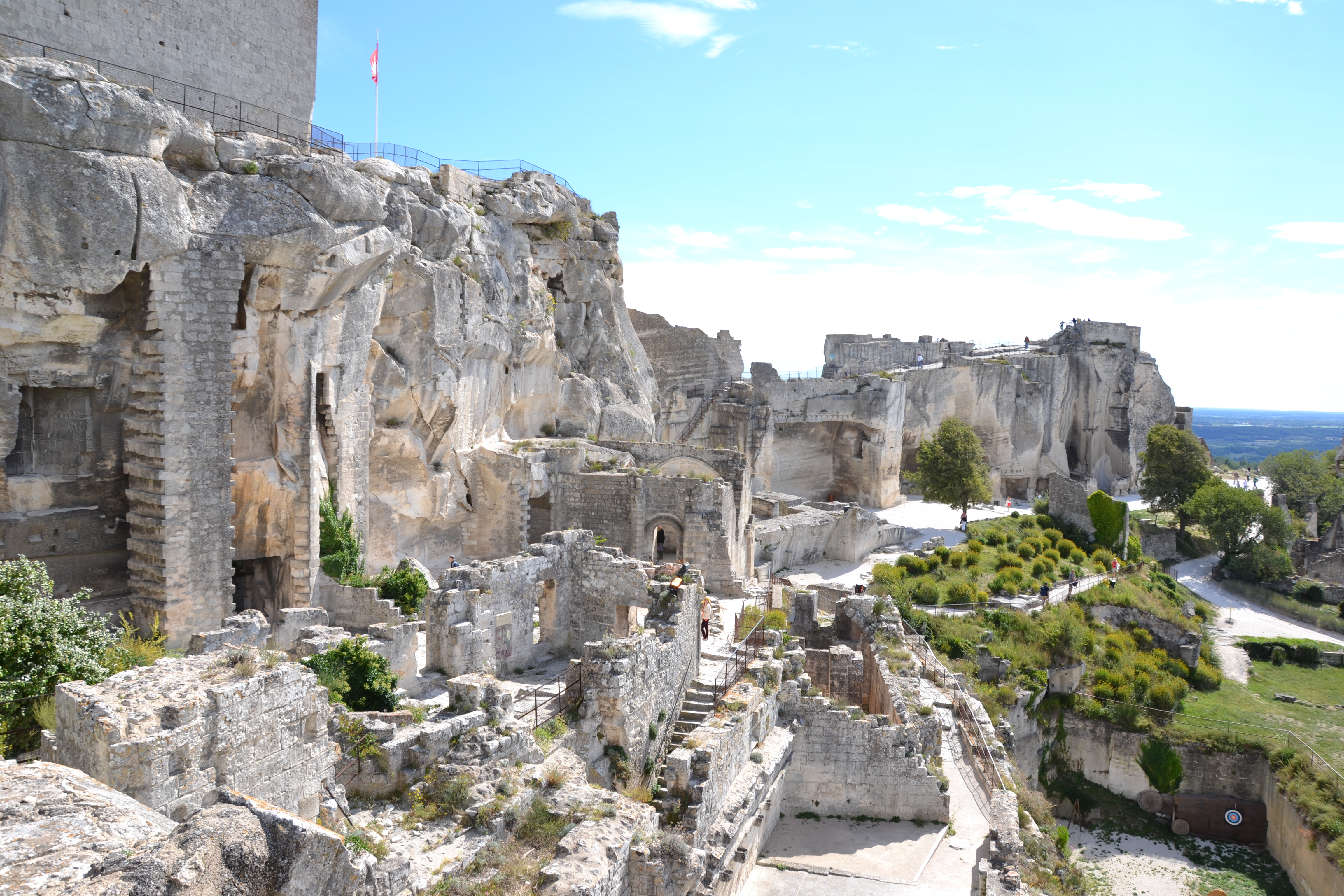 Château (Classé) .